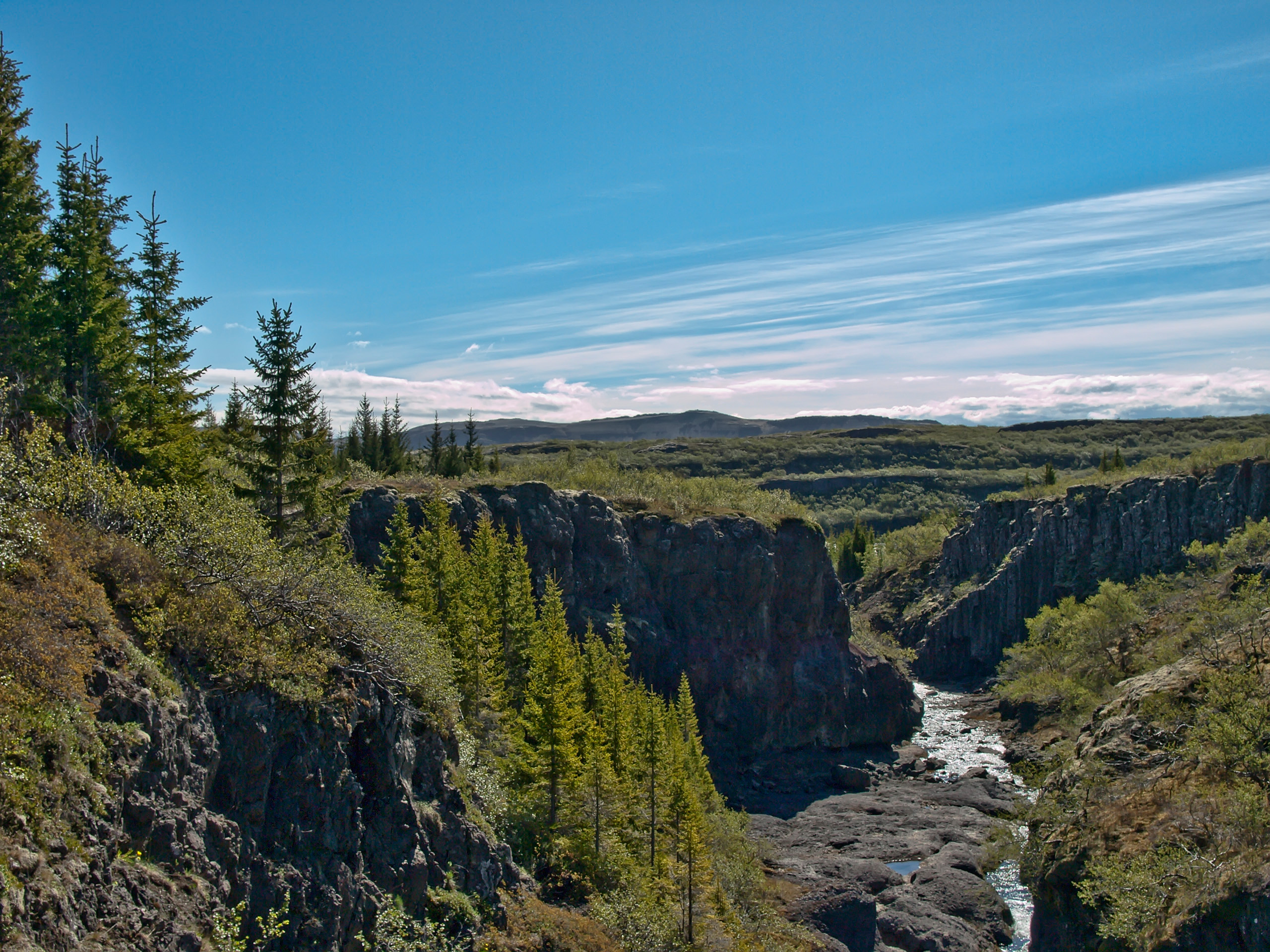 Spruces in Jafnaskarðsskógur, Iceland